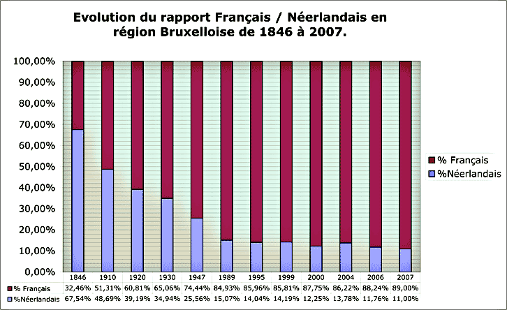 Statistique de l'évolution linguistique de la région Bruxeloise entre 1846 et 2007